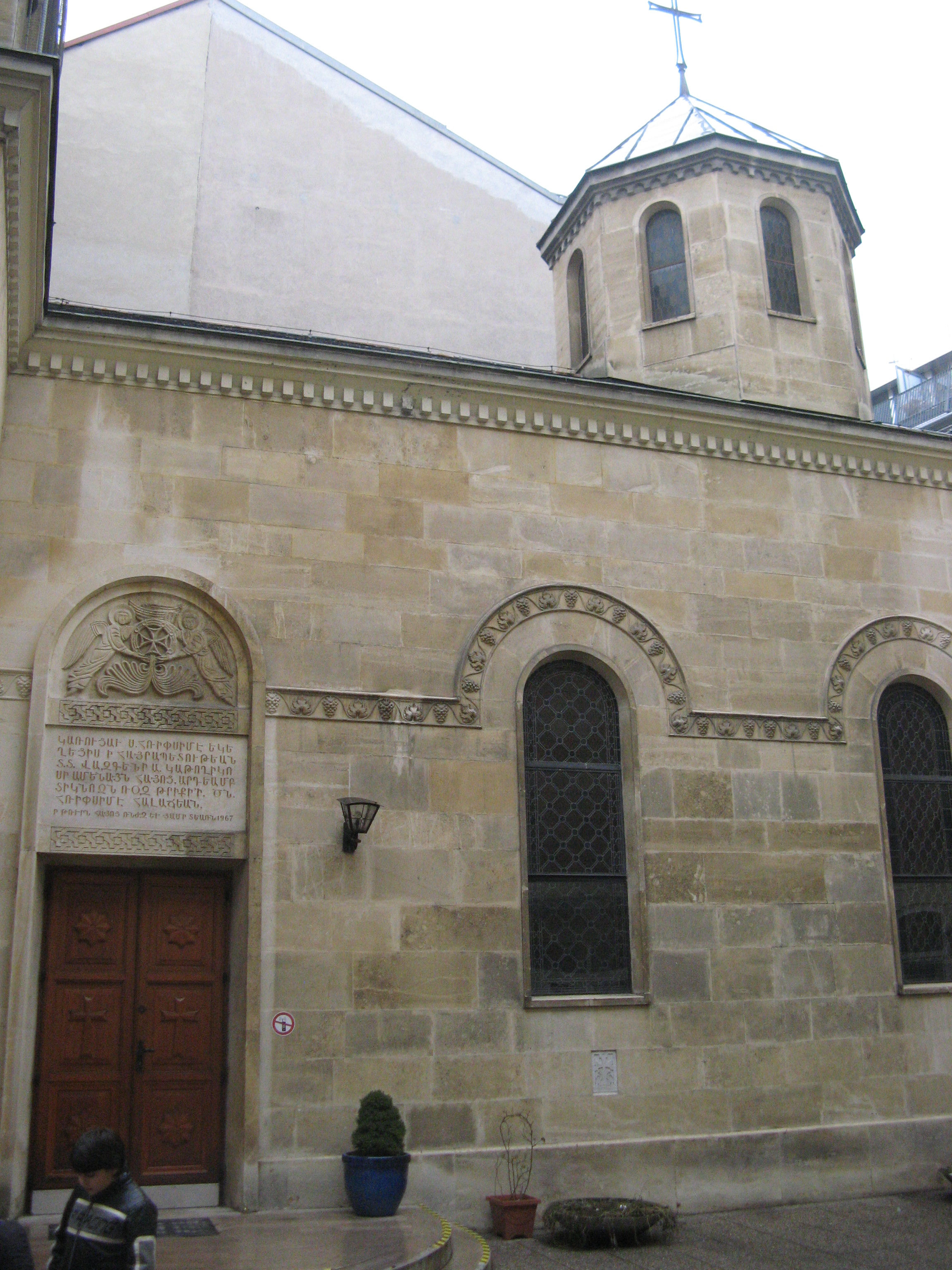 Armenische Kirche St. Hripsime (1967), Kolonitzgasse 11, Wien-Landstraße